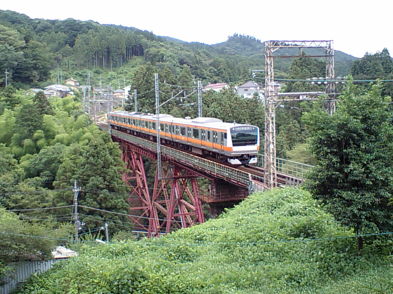 =青梅線E233系 二俣尾-軍畑間